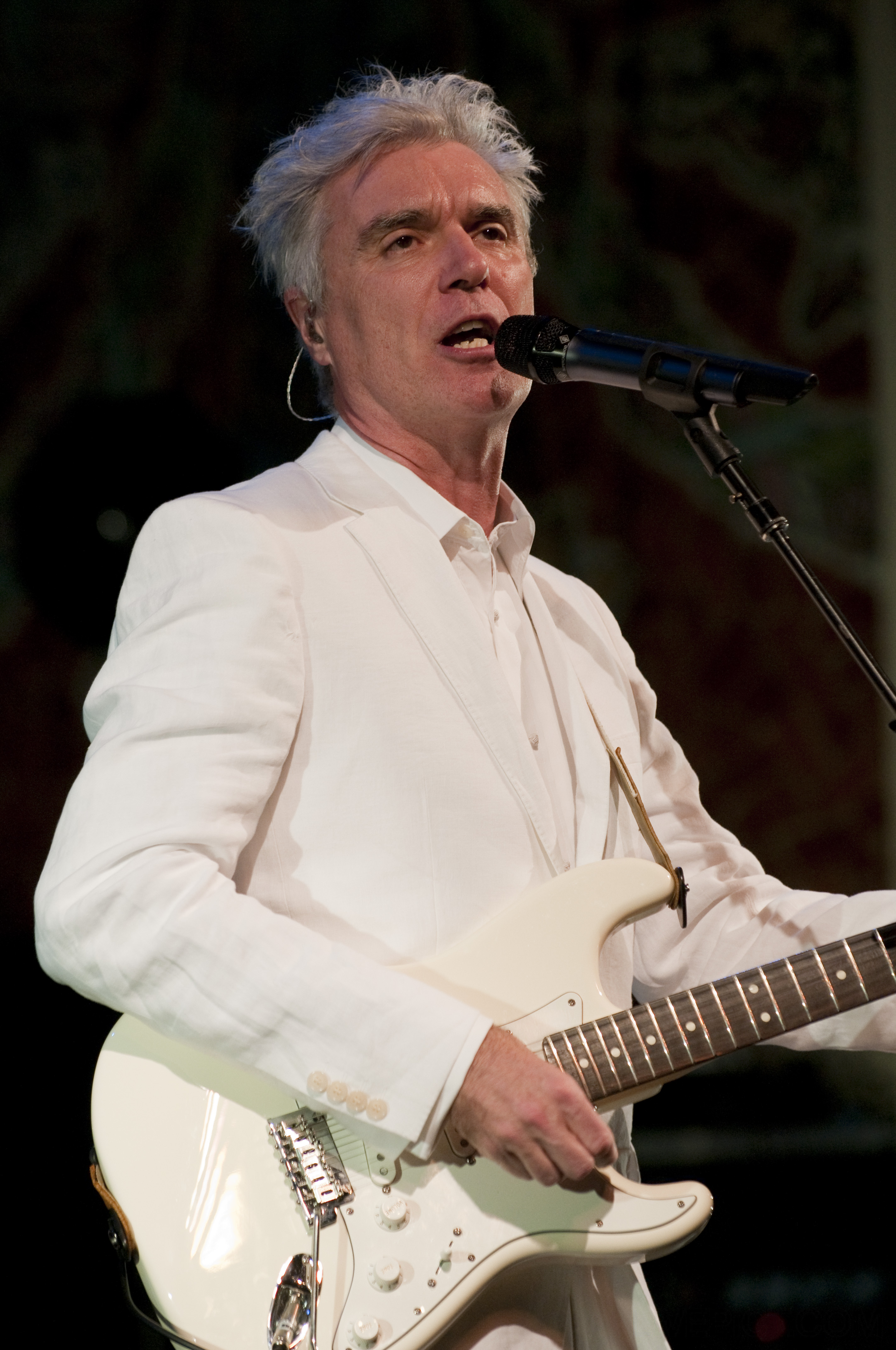 David Byrne